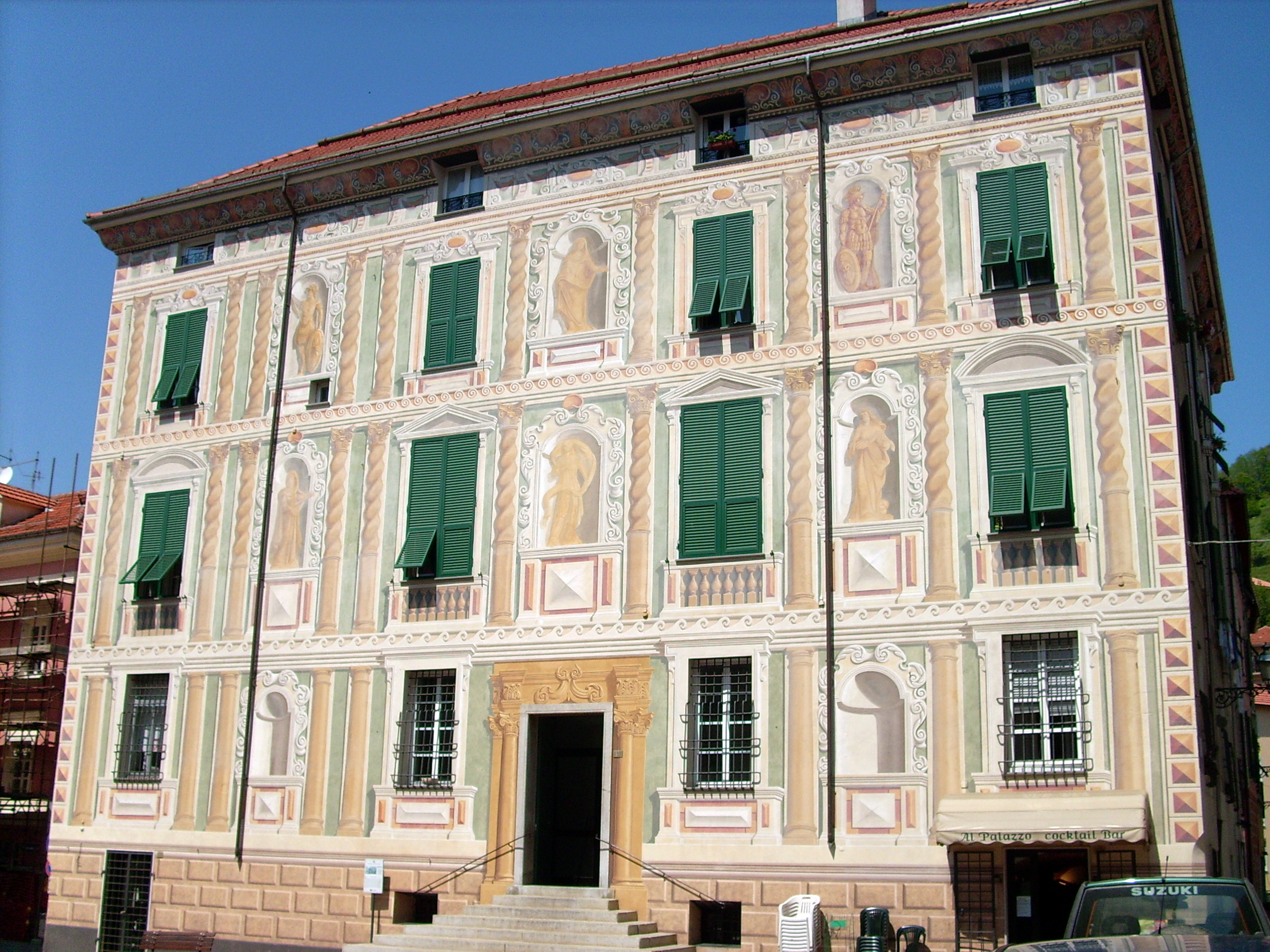 Palazzo Spinola (XIV secolo) presso Campo Ligure, Liguria, Italia